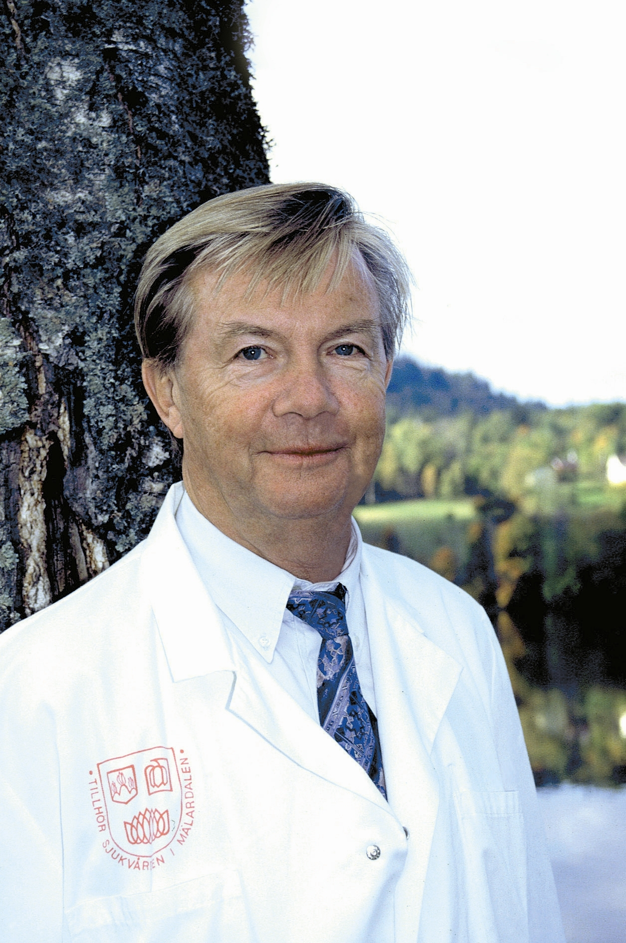 Tom Saldeen